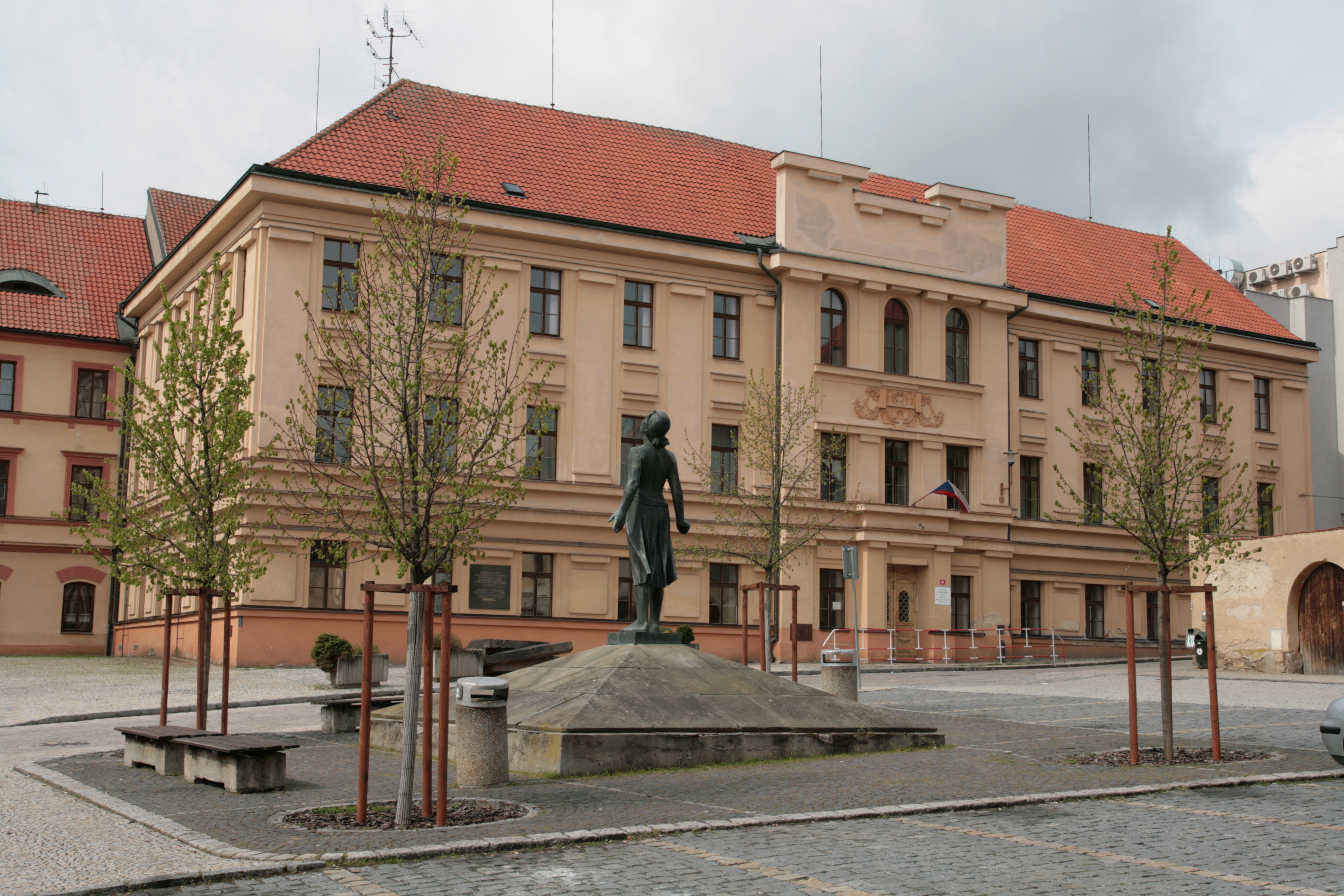 Město Domažlice. Pomník obětem nacismu na Chodském náměstí s bronzovou sochou Píseň vítězství od Otakara Švece. V pozadí budova Střední zdravotnické školy, bývalého gymnázia, v domě čp. 97.